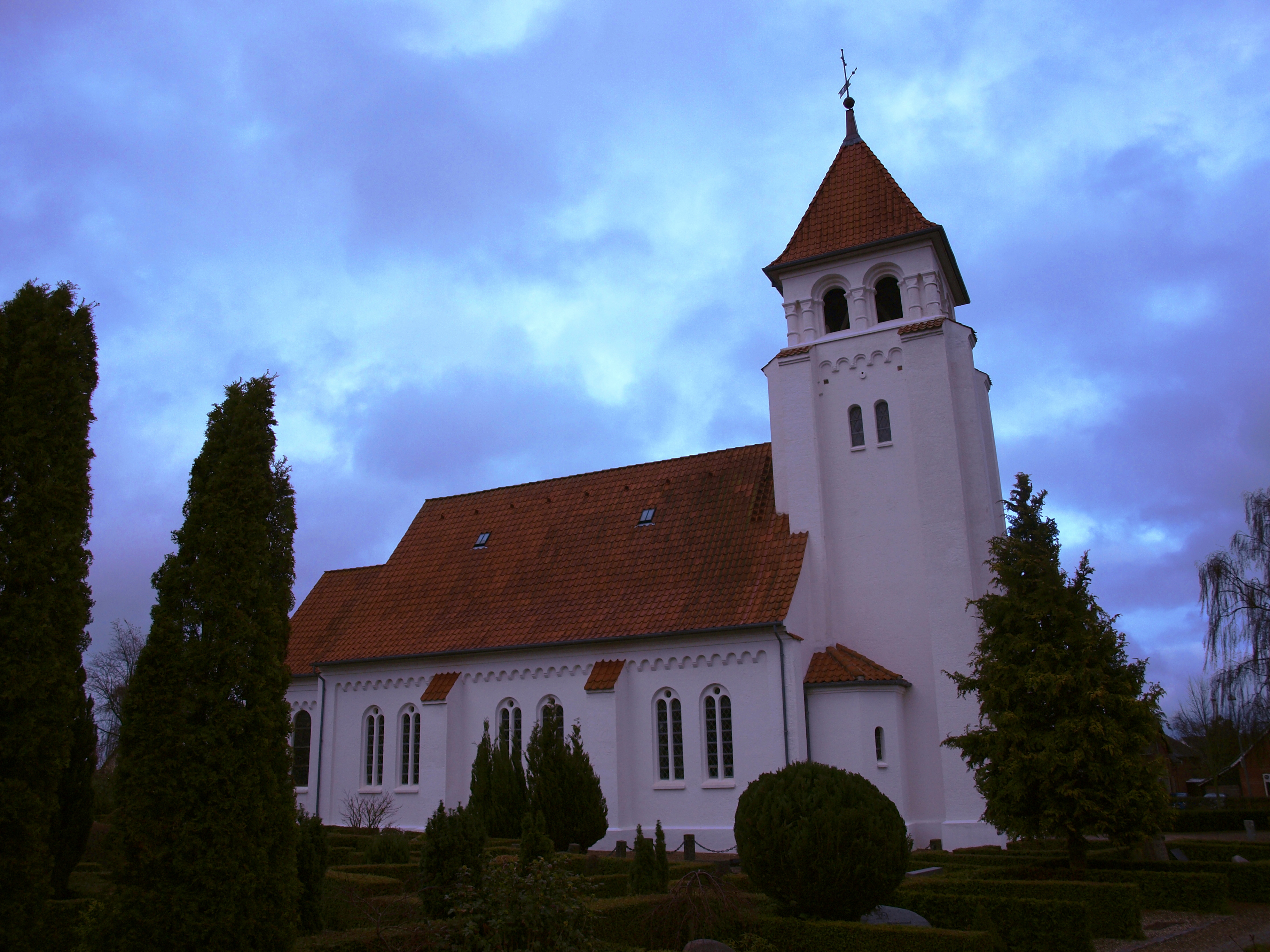 Nørre Bjert Kirke, 15. april 2015